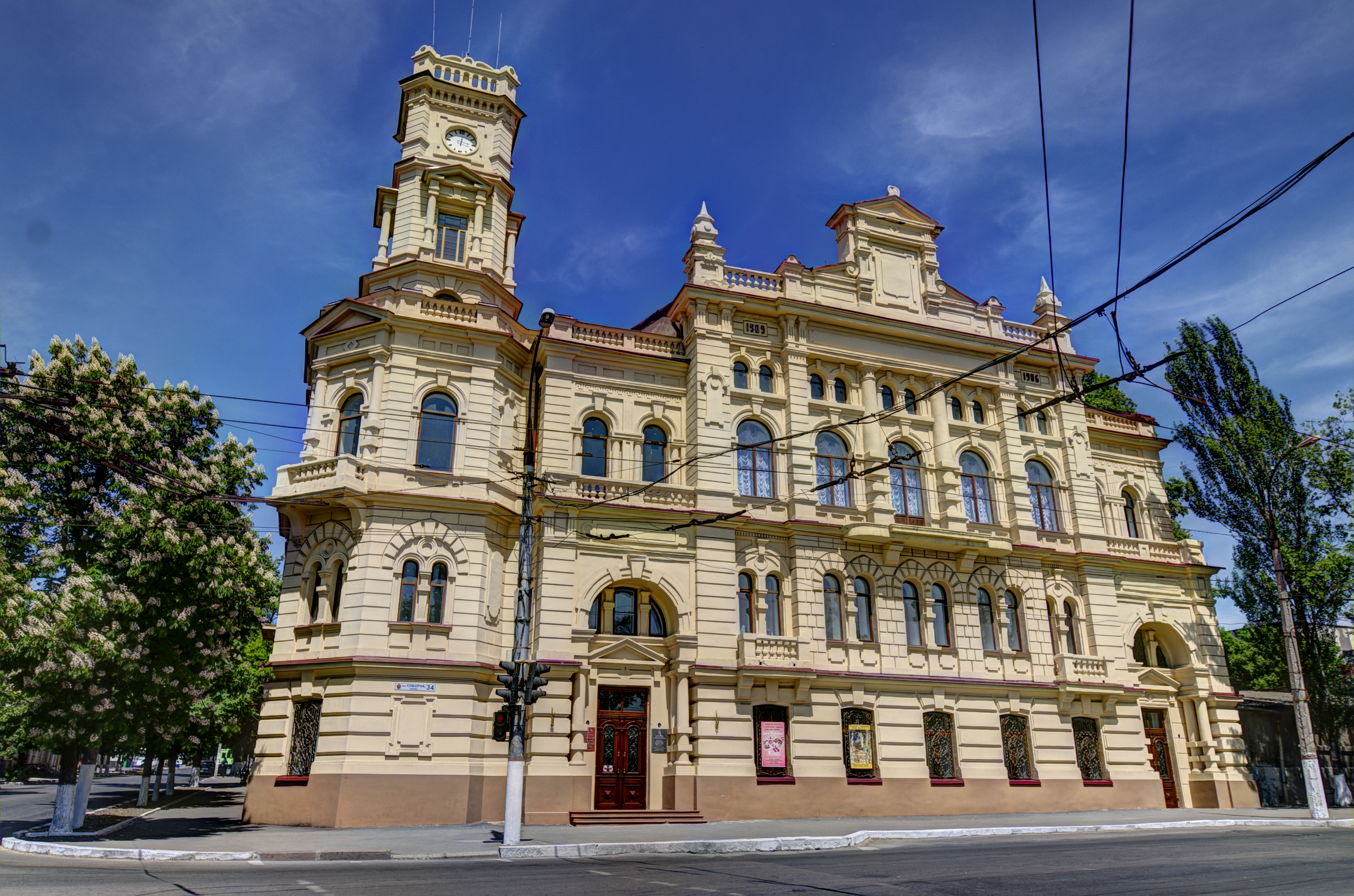 Будівля міської думи, Херсон, Леніна вул., 34